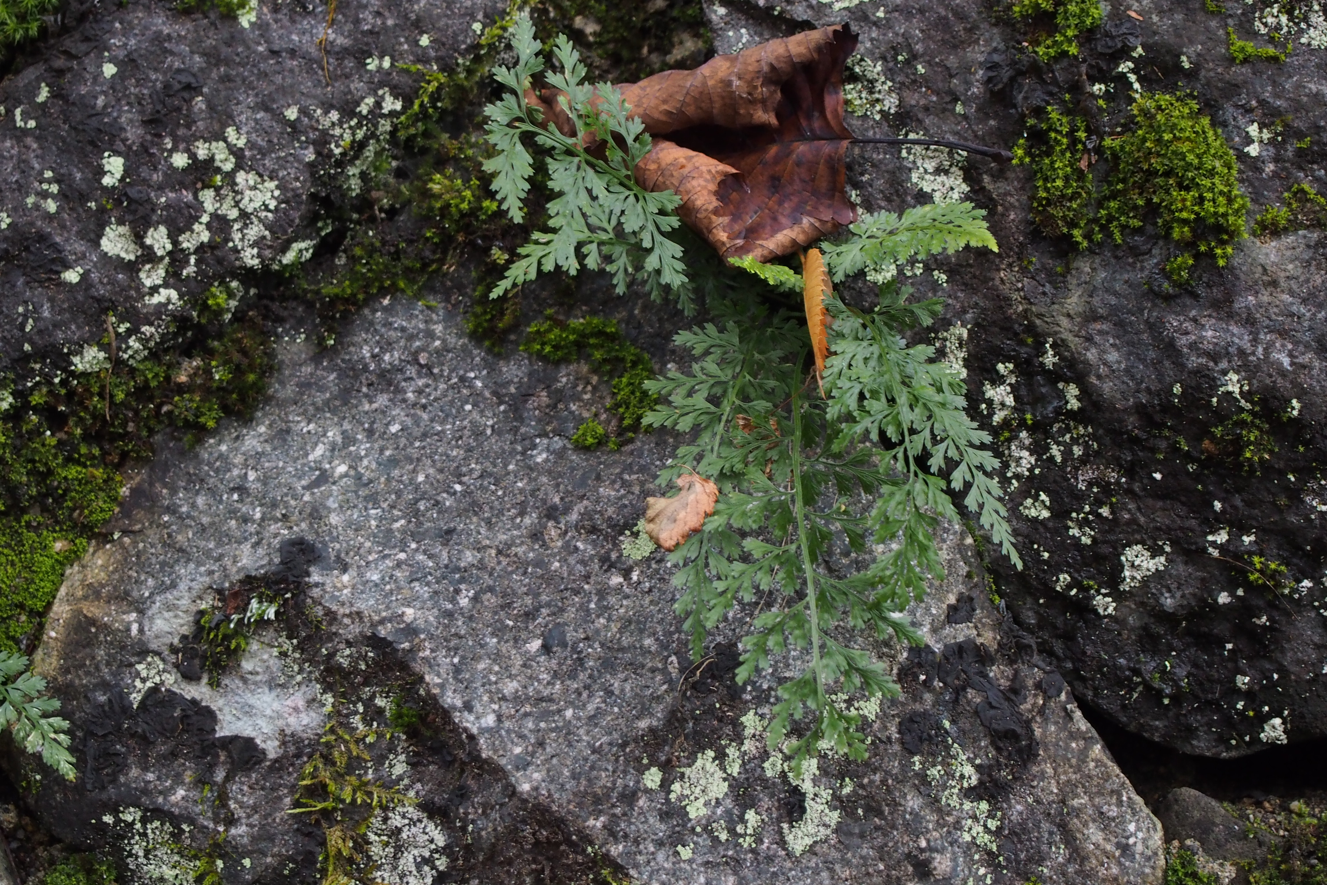 may be アオガネシダ. 中軸、羽軸とも凹んで溝となる.